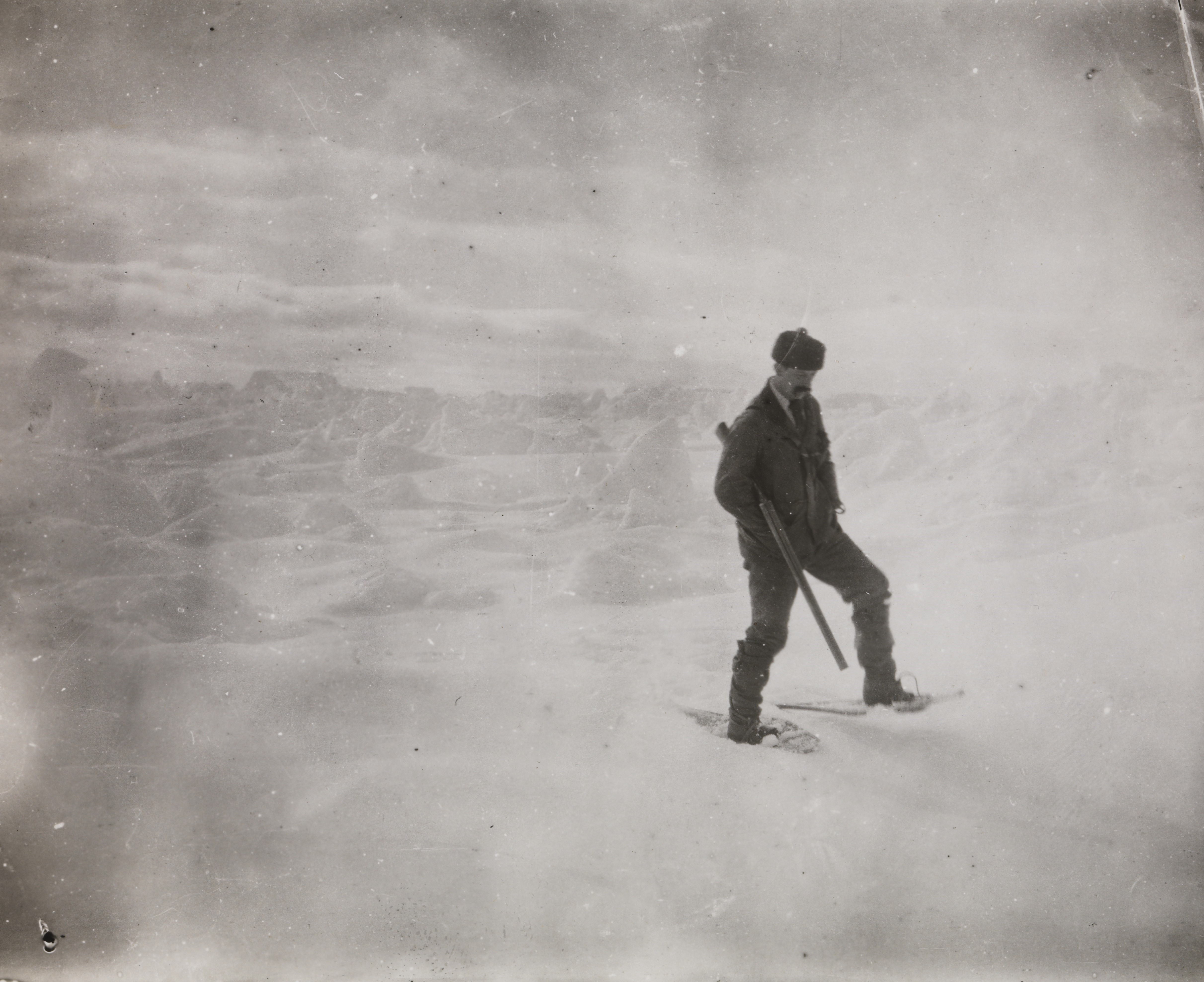 Frederick George Jackson, britisk offiser, polarforsker og leder for ekspedisjonen til Frans Josefs Land 1894-1897 vandrer i snøen med indianertruger på beina. Ett av bildene fra ekspedisjonen med polarskip mot Nordpolen i perioden 24 juni 1893 til 13 august 1896. Etter planen skulle skipet drive i isen med havstrømmer fra Sibirkysten over Nordpolen mot Grønland. I mars 1895 foretok Fridtjof Nansen sammen med en ledsager en hasardiøs skiferd med hundesleder i forsøket på å komme til polpunktet. Depicted person: Jackson, Frederick George (1860-1938) Depicted place: Russland, Frans Josefs Land, Kap Flora